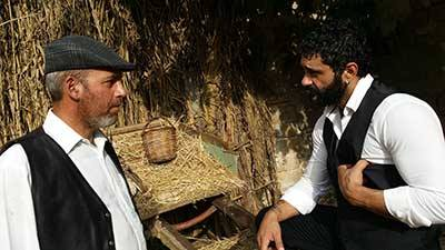 Il Duello